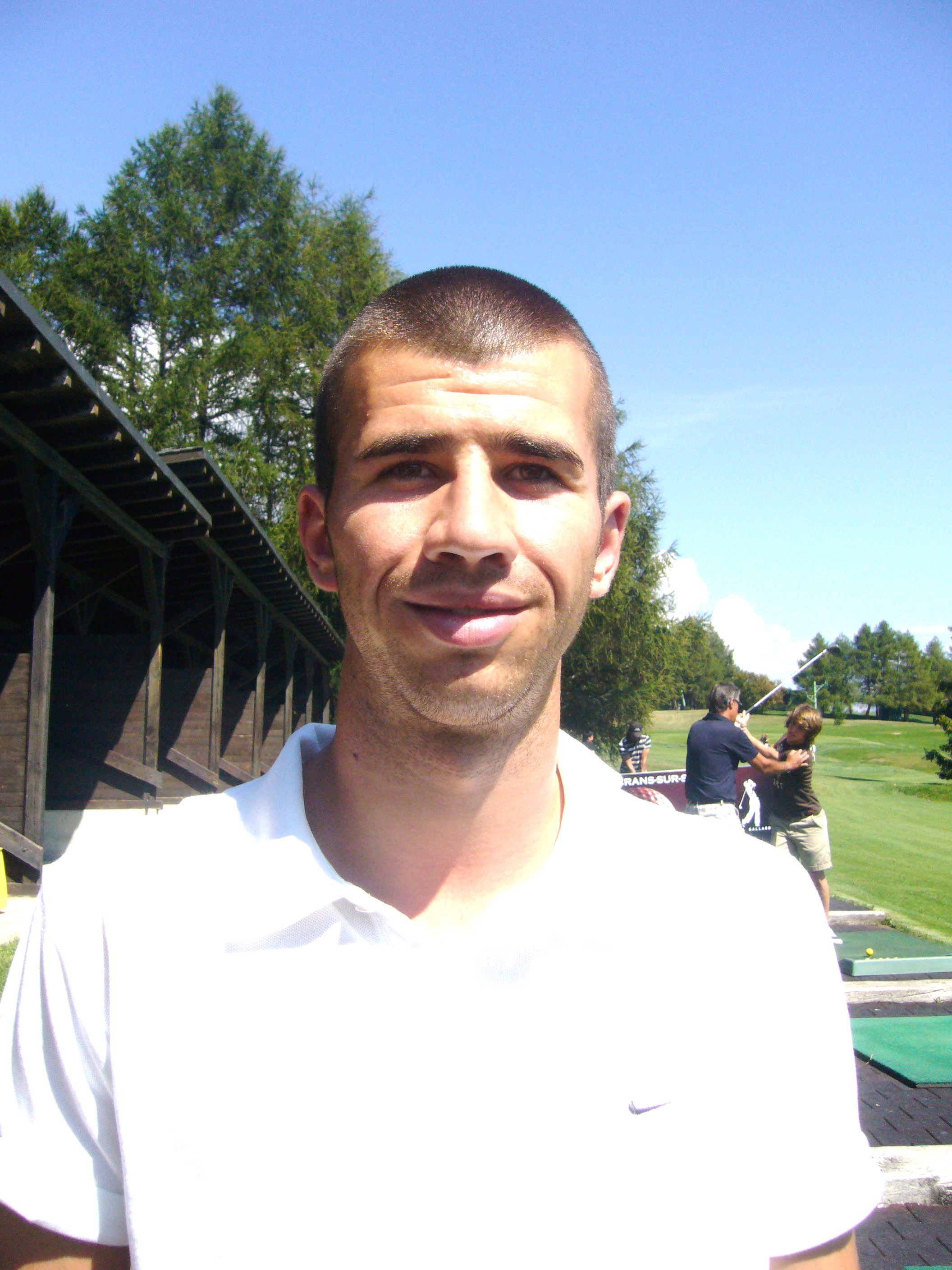 Nicolas D'Incau in Crans